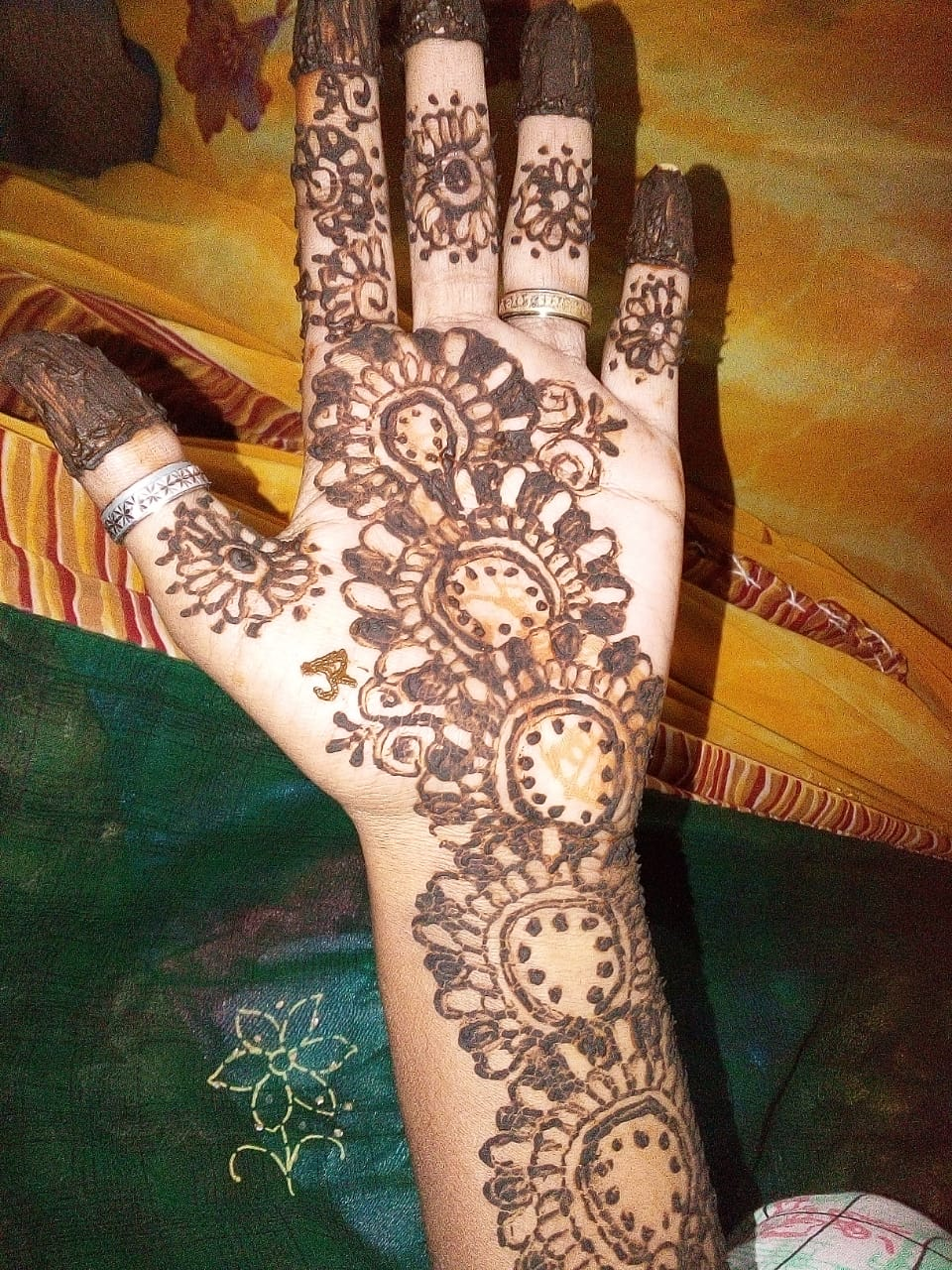 It is a picture of Mehndi. Mainly Indian girls use it for getdolledup